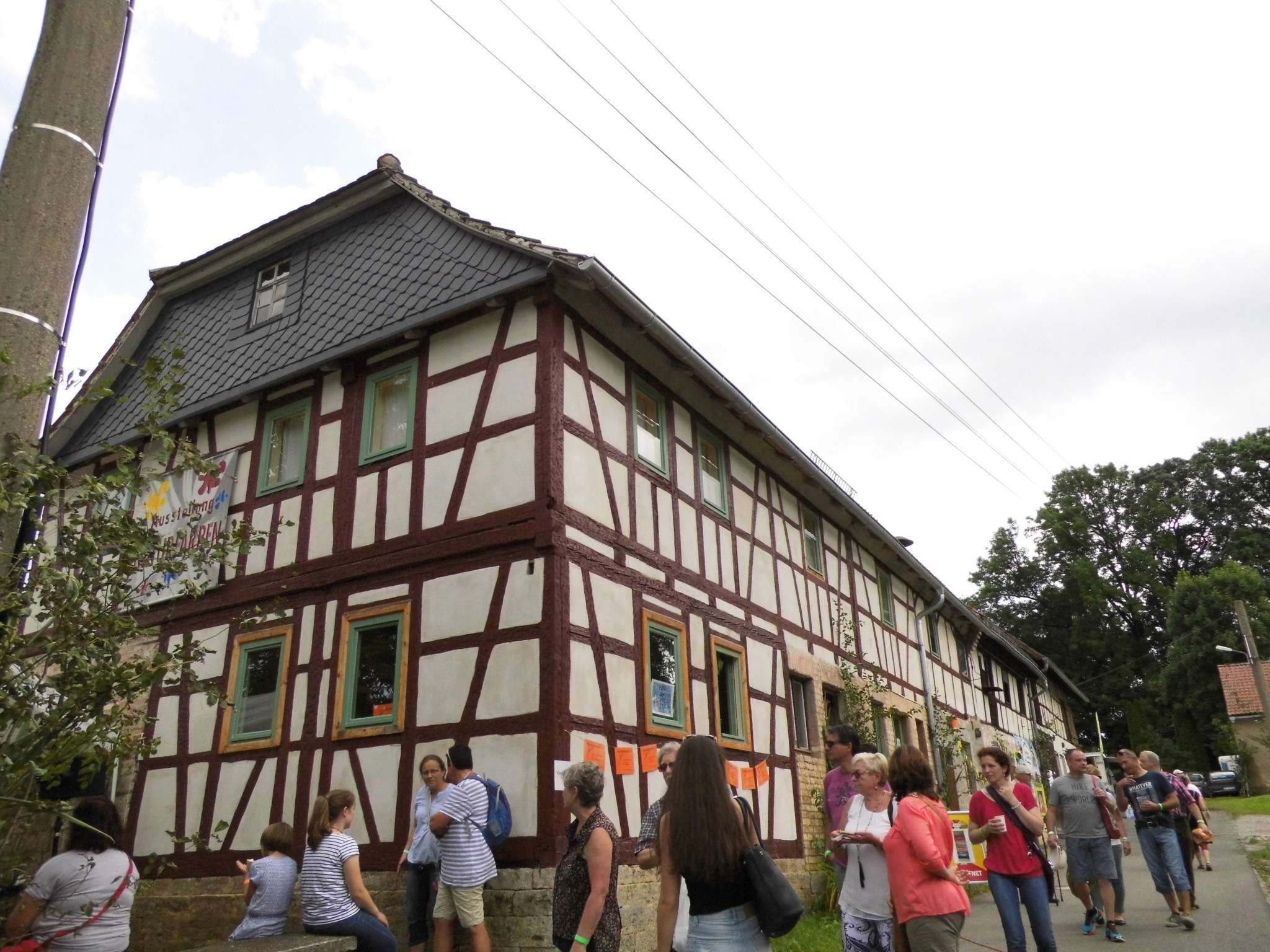 Haus der Farben in Neckeroda